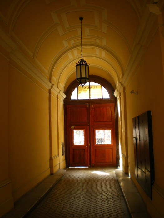 Teréz körút 11. szám alatti társasház kapubejárója Budapesten (VI. ker.)